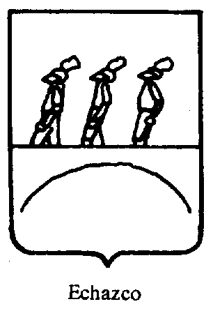 Escudo del apellido Etxazko. En rojo, un puente de oro, con tres caballeros de plata que lo atraviesan.